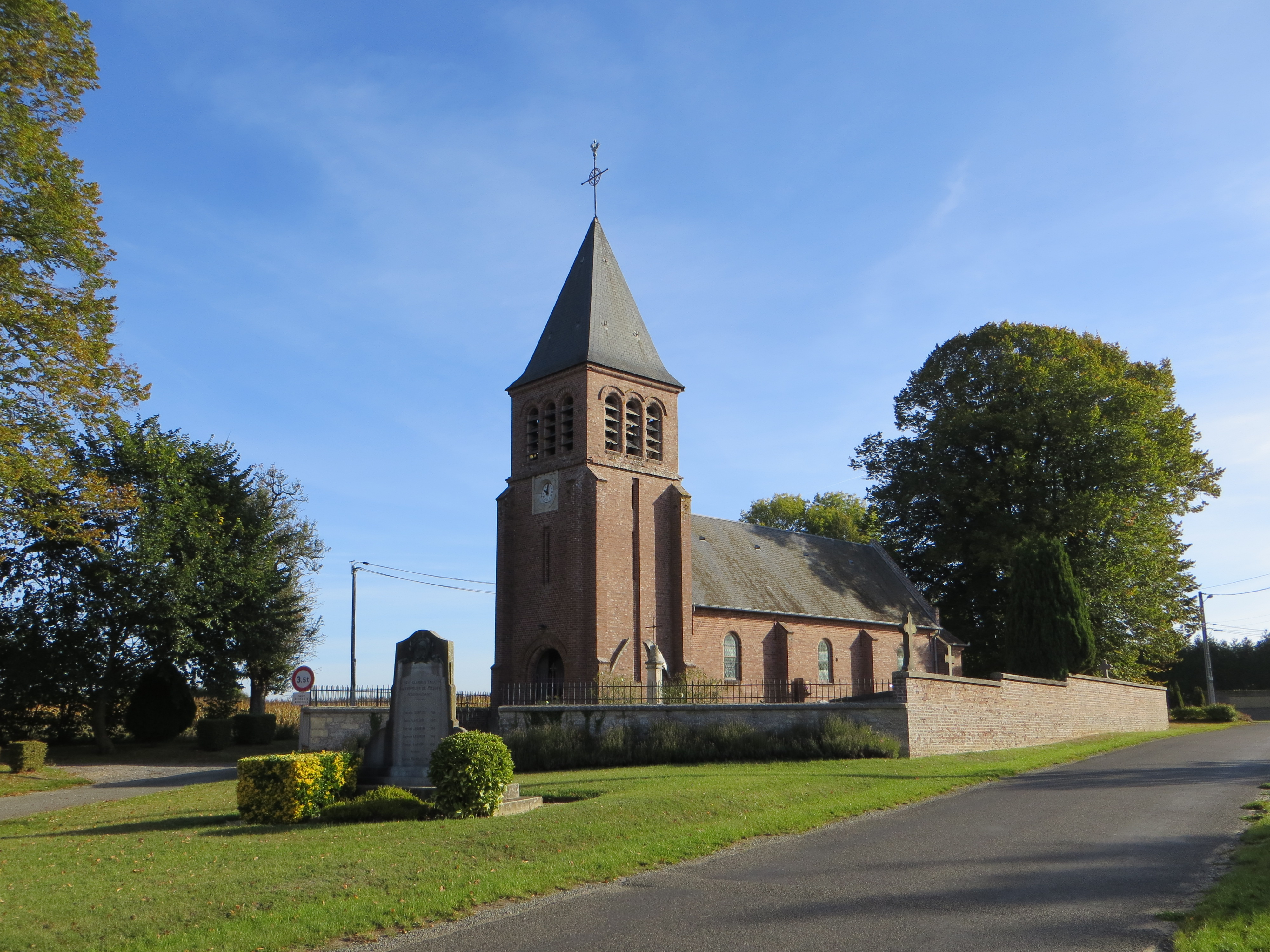 Vue générale de l'église et du moment aux morts